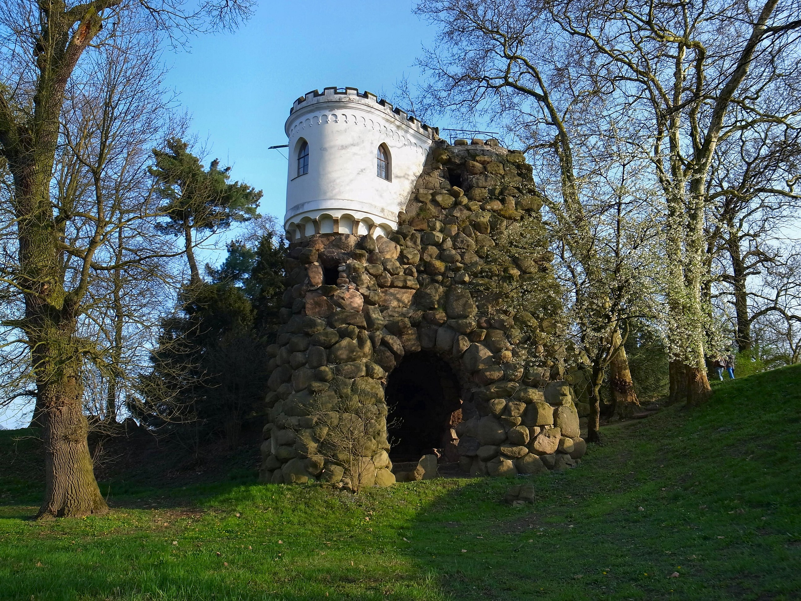 Wörlitz,Luisenklippe